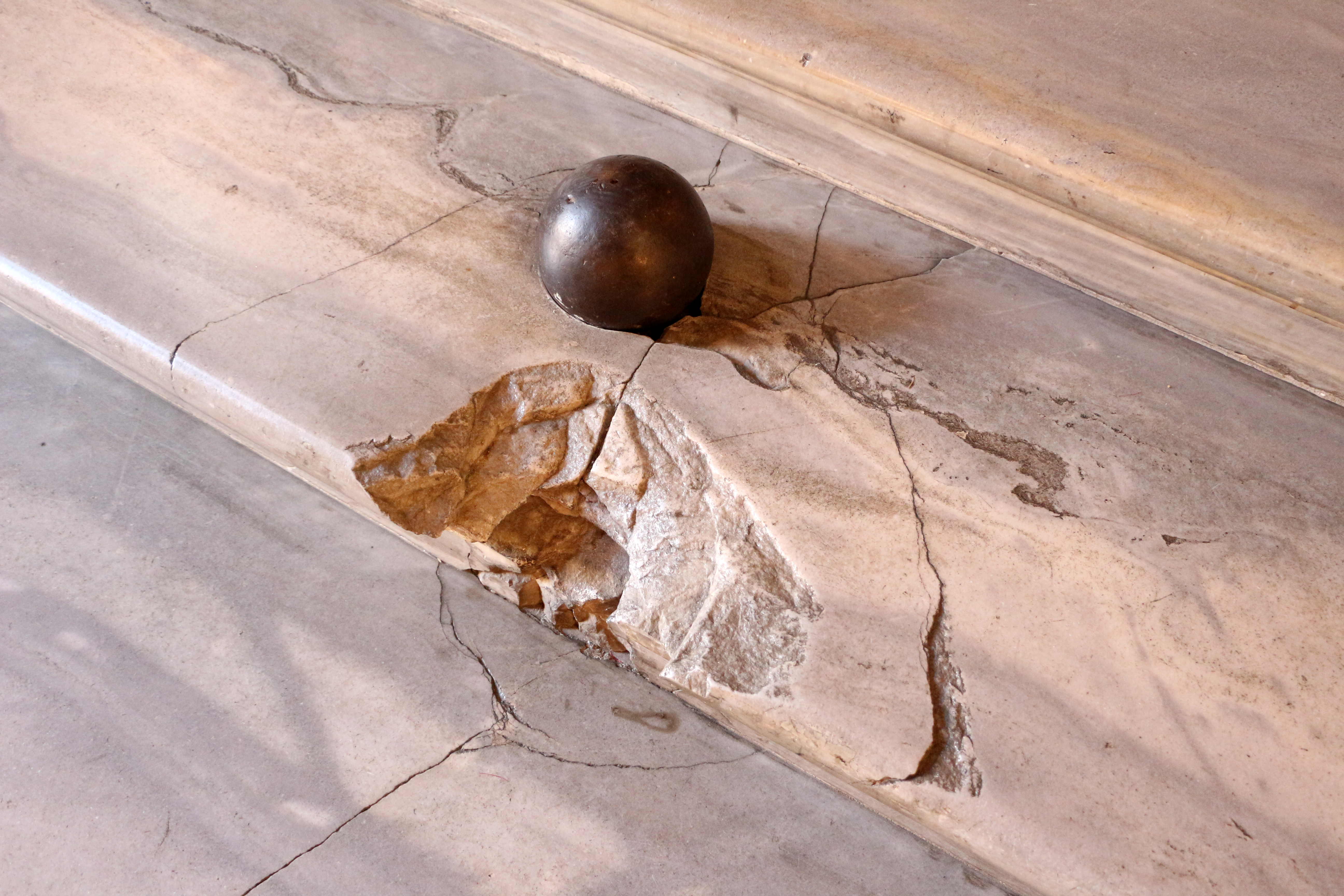 Galleria di palazzo colonna, palla di cannone sparata dai francesi al gianicolo nel 1849 durante le lotte della repubblica romana, 02.JPG